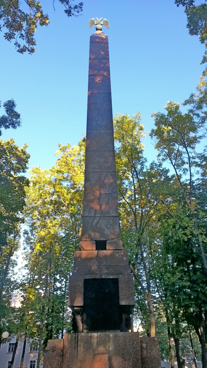 Беларуская (тарашкевіца): Помнік героям Айчыннай вайны 1812 года. г. Віцебск This is a photo of Belarusian heritage monument. Reference number: 213Д000069 ( WLM)